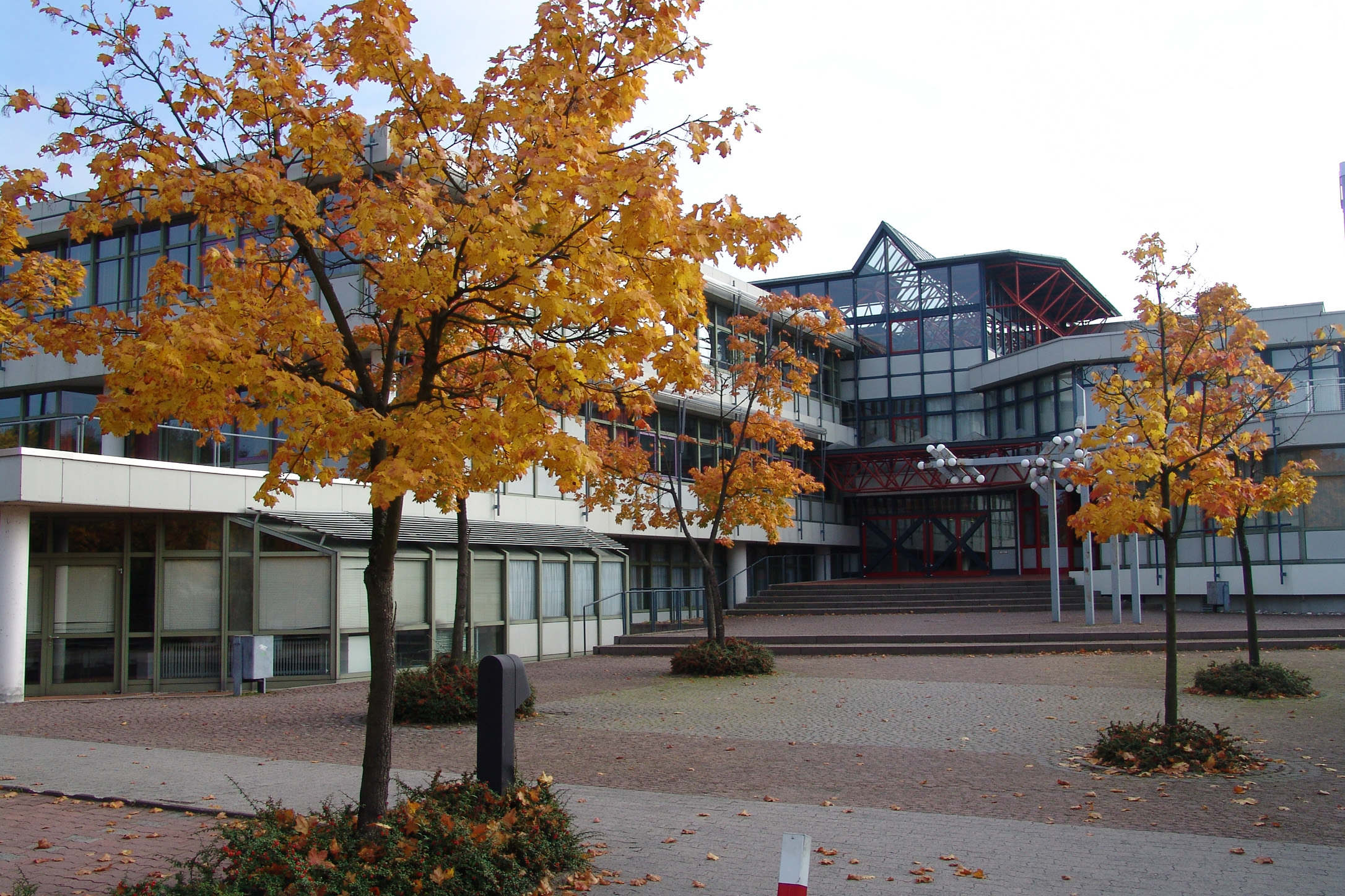 Haupteingang des Elly-Heuss-Gymnasiums Bildarchiv der Stadt Weiden. Veröffentlichungsrechte bei der Stadt